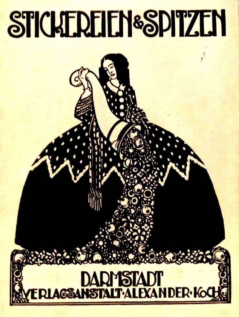 Titelbild (Ausschnitt) der „Stickerei- und Spitzen-Rundschau. Illustrierte Monatshefte zur Förderung der deutschen Stickerei- und Spitzen-Industrie. Zentral-Organ für die Hebung der künstlerischen Frauen-Handarbeiten“ Über die dargestellte Dame hieß es im Jahr in Band 18 auf Seite 136: „Irma Koch verkörperte das Titelbild der Stickerei-Zeitung als reizvolle Teepuppe; der Blumenregen aus dem Füllhorn verteilt sich zur Rockgirlande und wirkt in der frischen Farbenstimmung ungemein malerisch ...“ ...